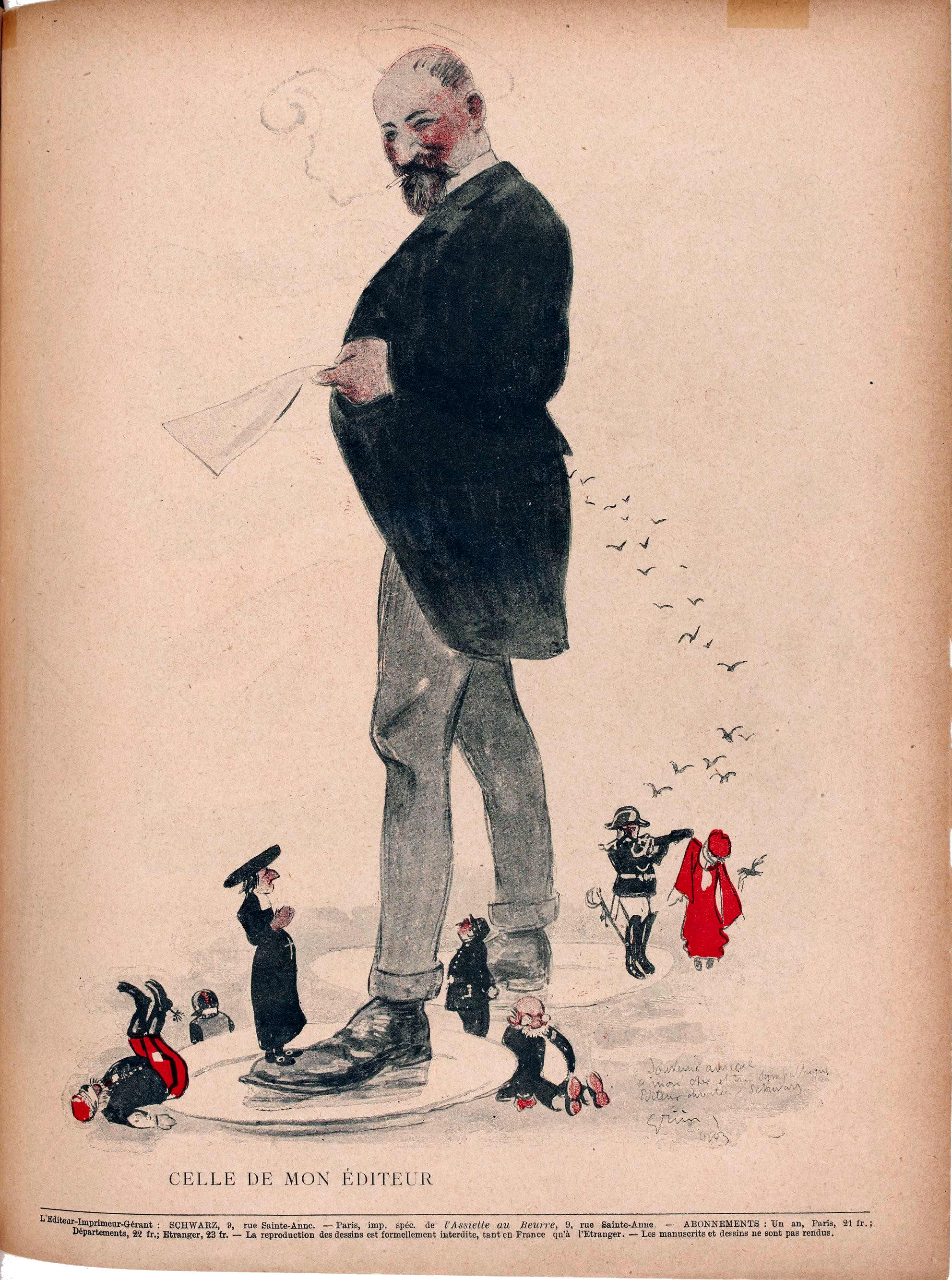 Portrait de Samuel-Sigismond Schwarz, éditeur de L'Assiette au beurre, par Jules Grün, paru en dernière du numéro « Leurs Gueules », n°104, 28 mars 1903.